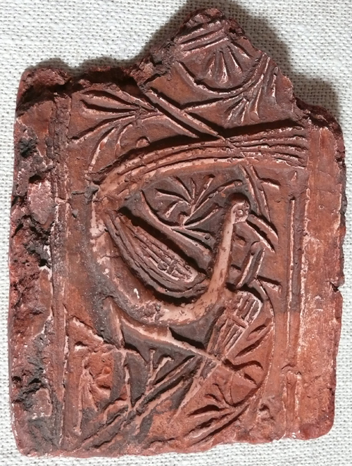 Kopie dlaždice z kostela Stětí sv. Jana Křtitele